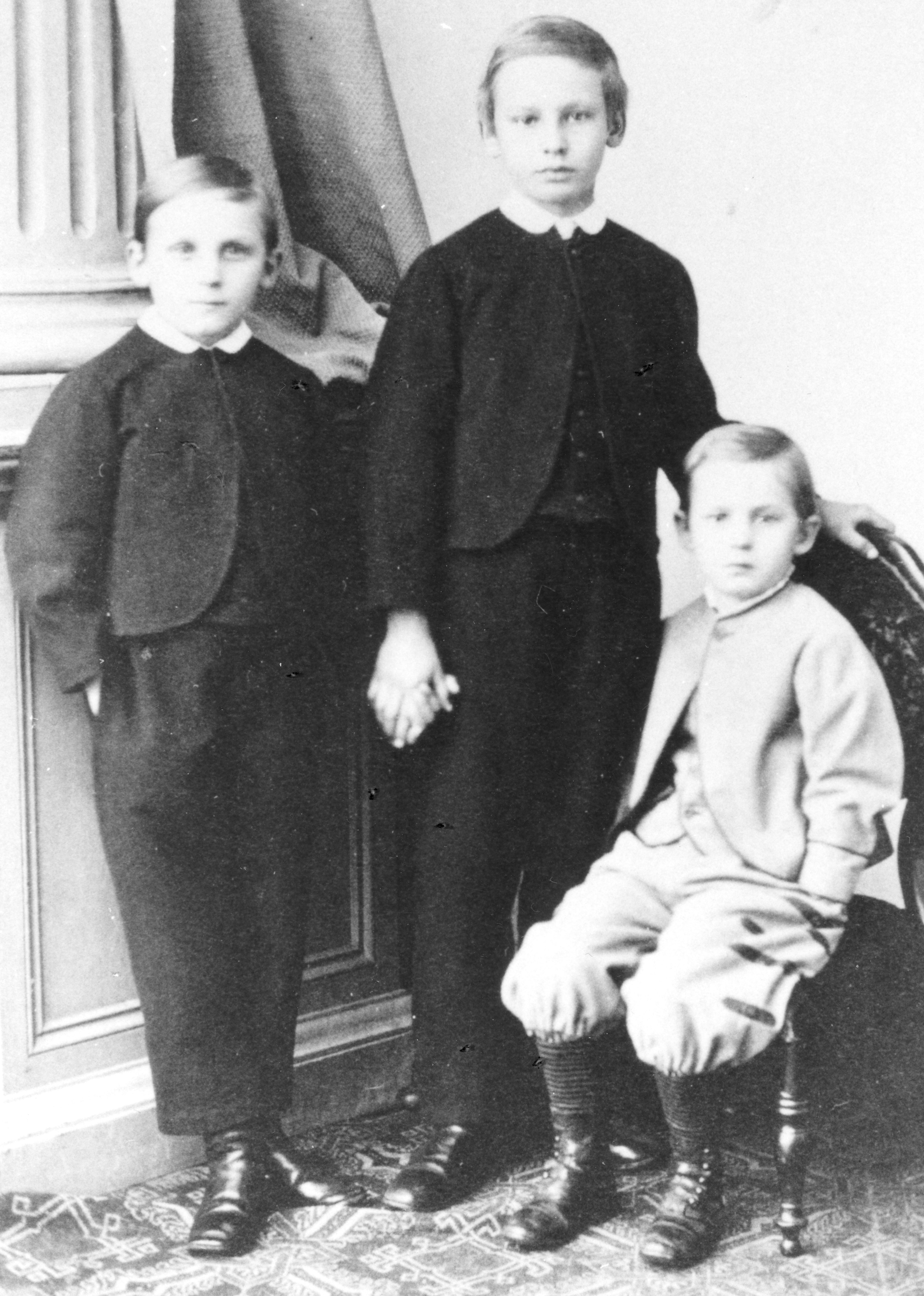 von links nach rechts: die Brüder Georg Quidde, Ludwig Quidde und Rudolf Quidde